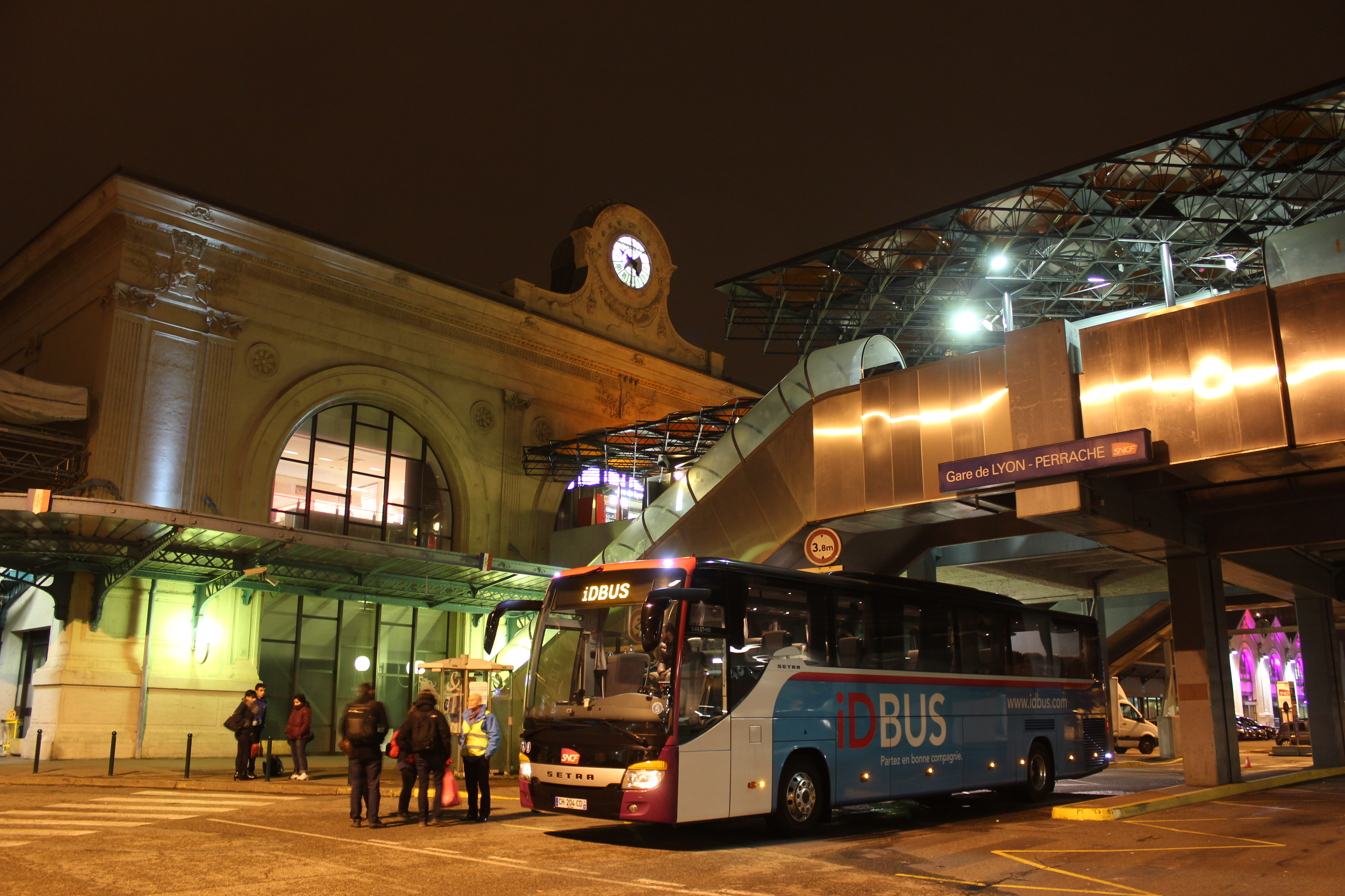 Le Setra S 416 GT-HD, immatriculé CH-204-CD, de la société iDBUS, est vu à la gare de Lyon Perrache